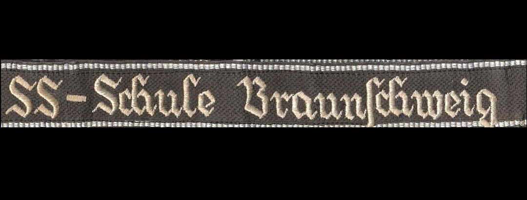 Ärmelbandabzeichen Junkerschule Braunschweig, Germany, ähnlich wie hier [1]